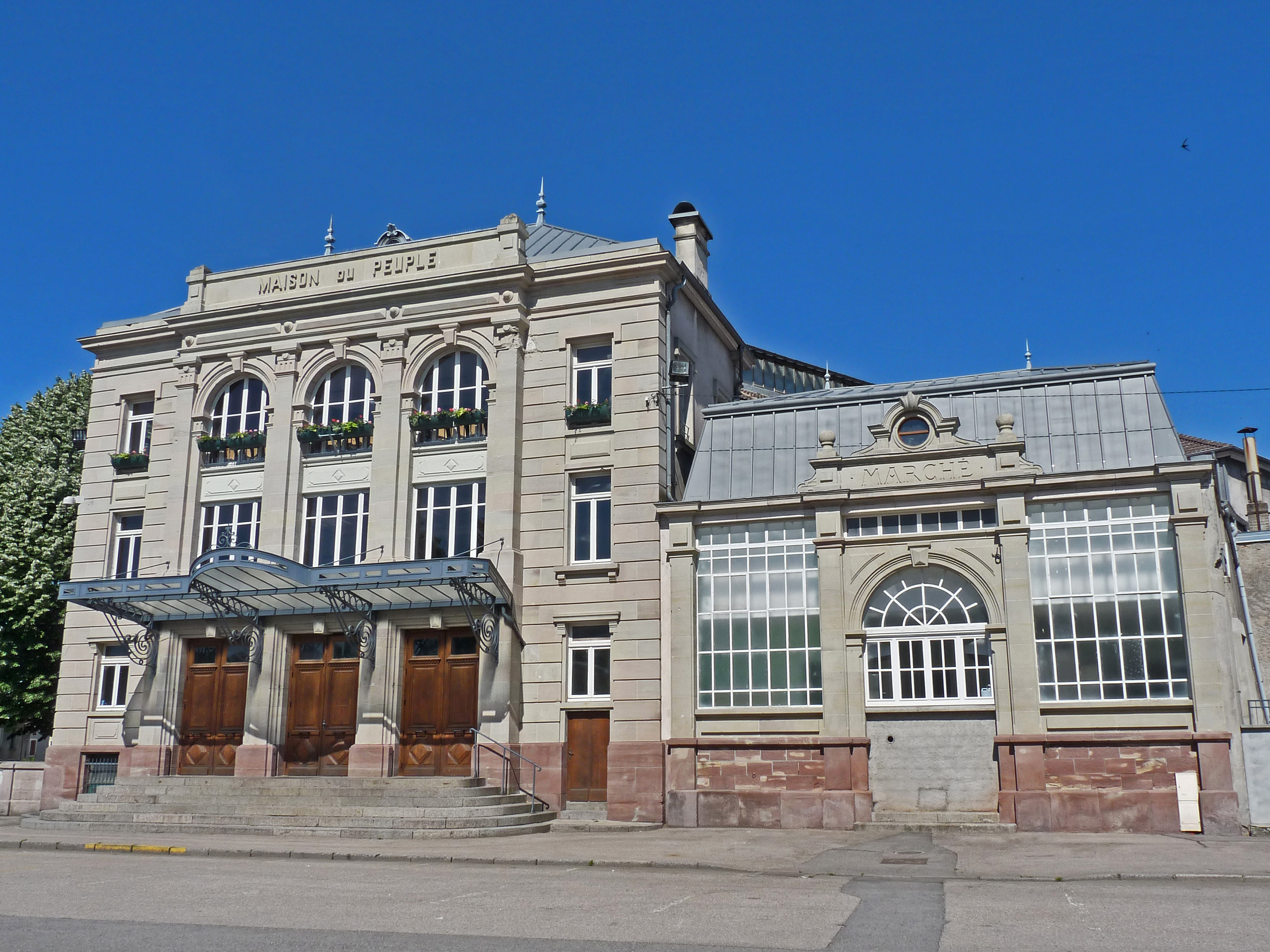 Rambervillers (Vosges), place Émile Drouel : salle des Fêtes (autrefois Maison du Peuple et Marché)